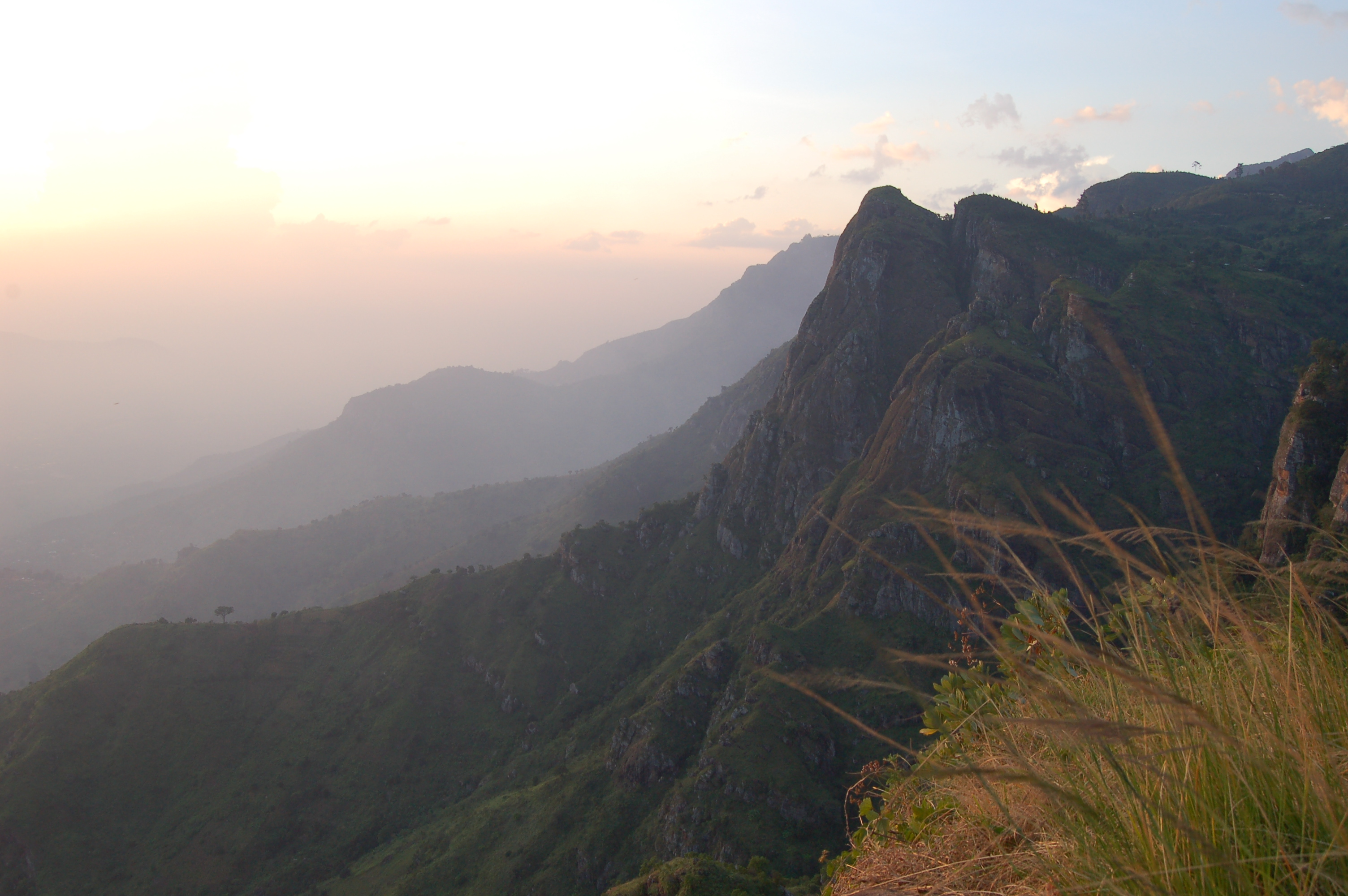 Usambara Mountains, Tanzania